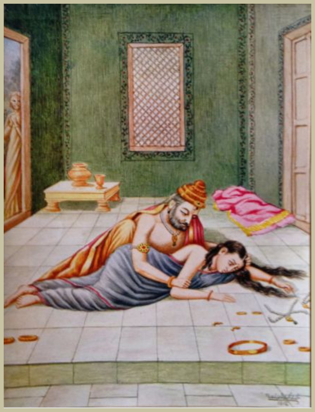 Chitra Ramayana (Illustrated Ramayana) is a simplified story of the great Indian epic in Kannada. The type is bold and beautiful. The thick pages have become brittle and need careful handling. Printed by B. Miller, Superintendent, British India, Press, Mazgaon, Bombay. It was published by, Shrimat Balasaheb Pandit Pant Pratinidhi, chief of Aundh, at Aundh, Satara district. The Kannada version is by Ramachandra Madhwa Mahishi The date shown is 1916. It is all the more important because the book contains illustrations painted by the publisher also called Bhavan Rao Shrinivas Rao, the ruler of the state of Aundh himself.